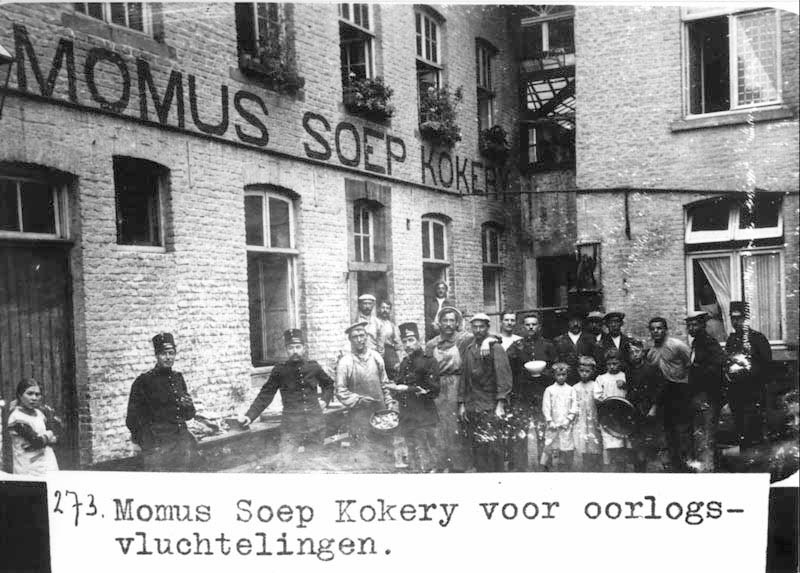 Soepuitdeling aan Belgische vluchtelingen in Maastricht in 1918. De Momus soepkeuken was gevestigd in het Heilige Geeststraatje tussen de Markt en de Grote Staat, vanouds een plek waar bedeling plaatsvond. Fotocollectie RHCL Maastricht, GAM 13761.